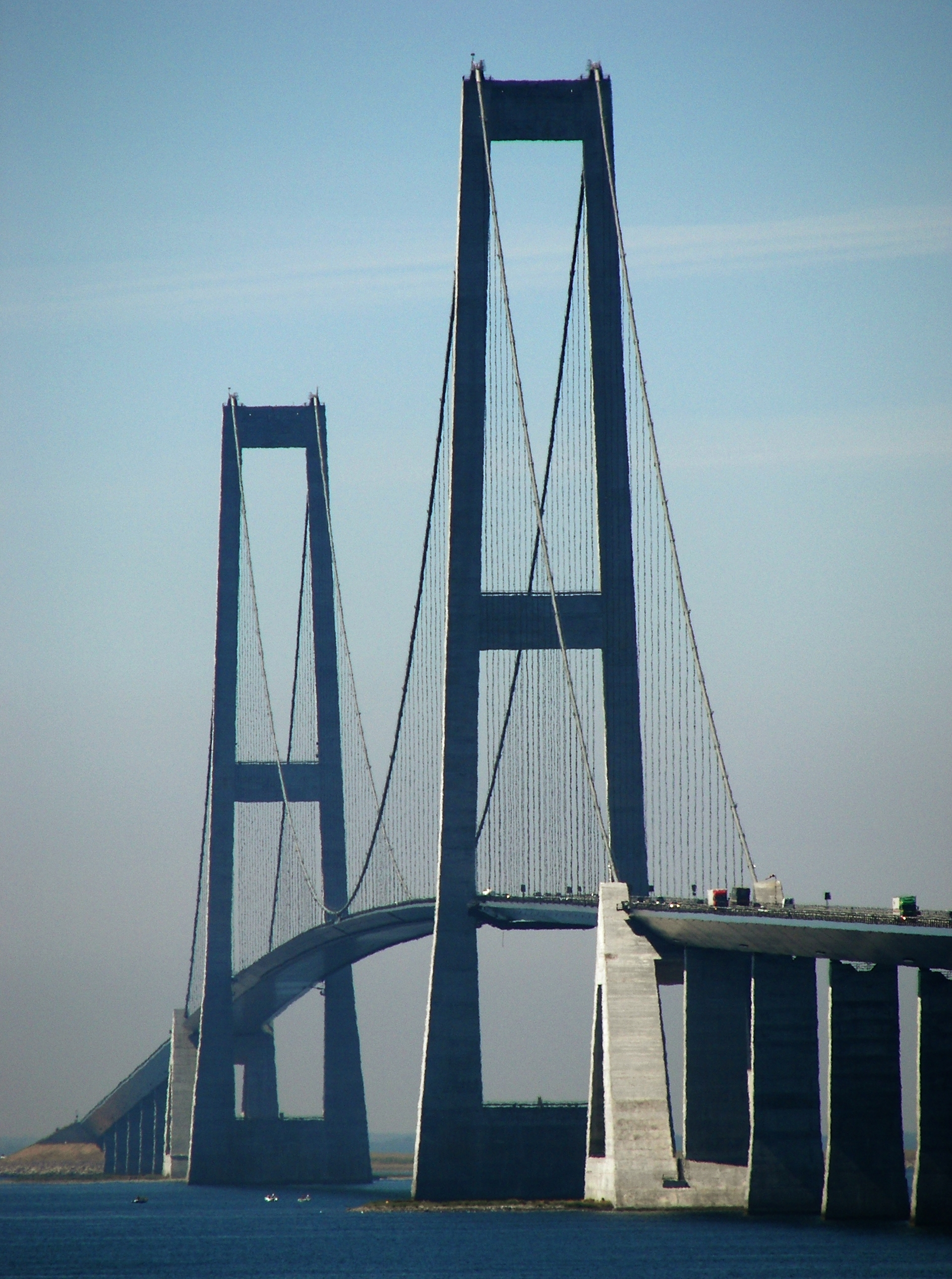 Storebæltsbroen.